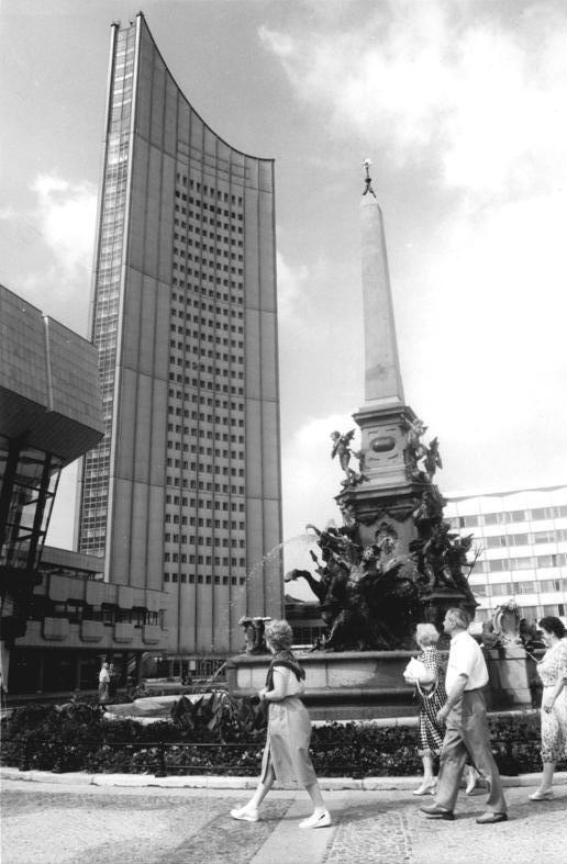 Leipzig, Karl-Marx-Platz, Brunnen ADN-ZB Gahlbeck 16.8.1982 Leipzig: In seiner endgültigen Gestalt präsentiert sich der Karl-Marx-Platz den Leipzigern und den Besuchern der Messestadt mit dem historischen Brunnen, dem Gewandhaus und dem Hochhaus der Karl-Marx-Universität. -siehe auch 1982-0816-3N